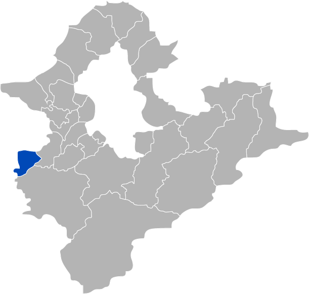 KaurJmeb為編寫臺灣省臺北縣鶯歌鎮，於2005年2月6日所繪